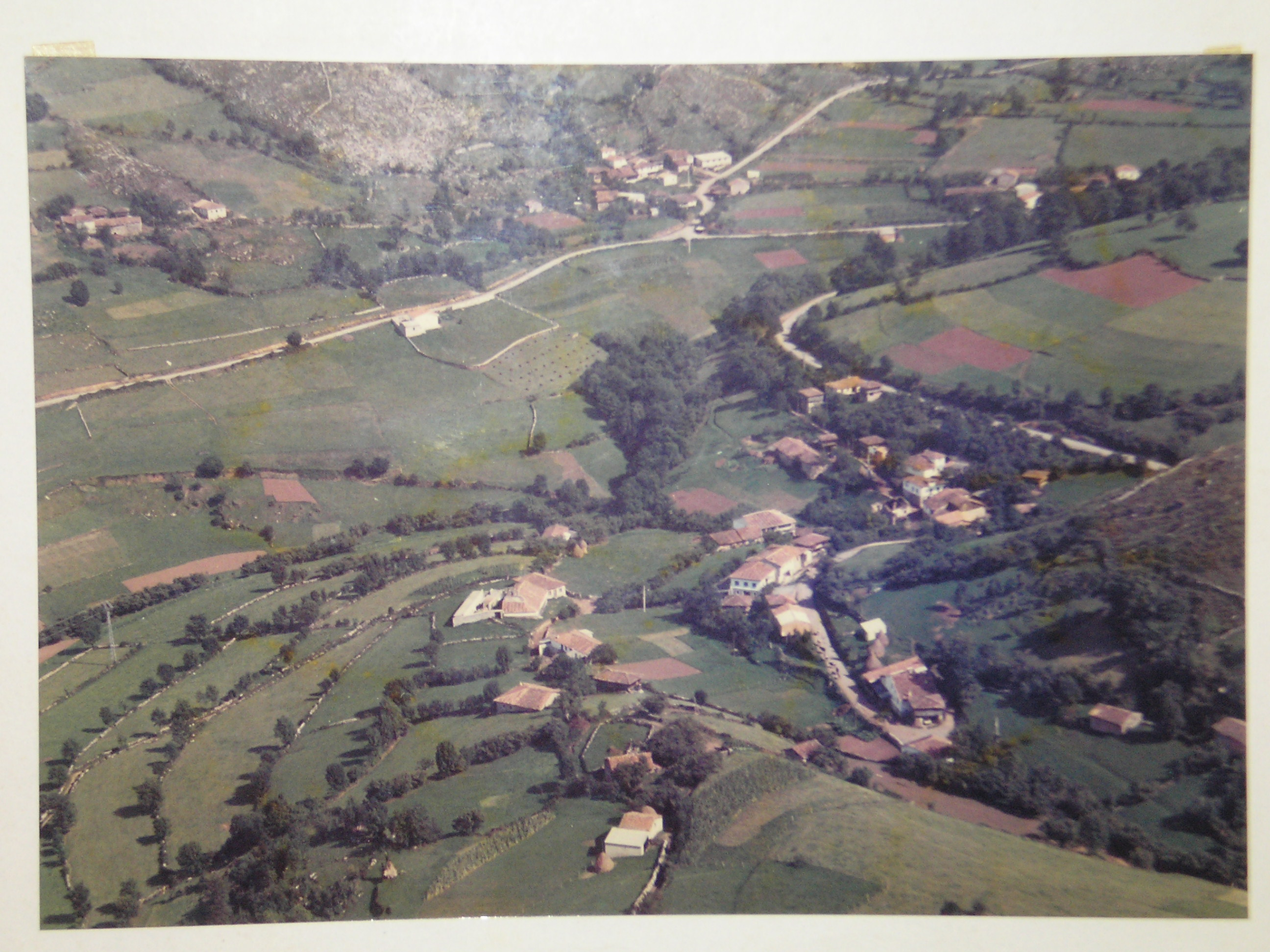 Vista General de Rubiano (Grado) en los años 70.